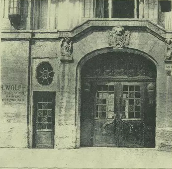 H. Wolff, Confection feiner Pelzwaren, 1910, Hauseingang Schützenstraße 65/66.